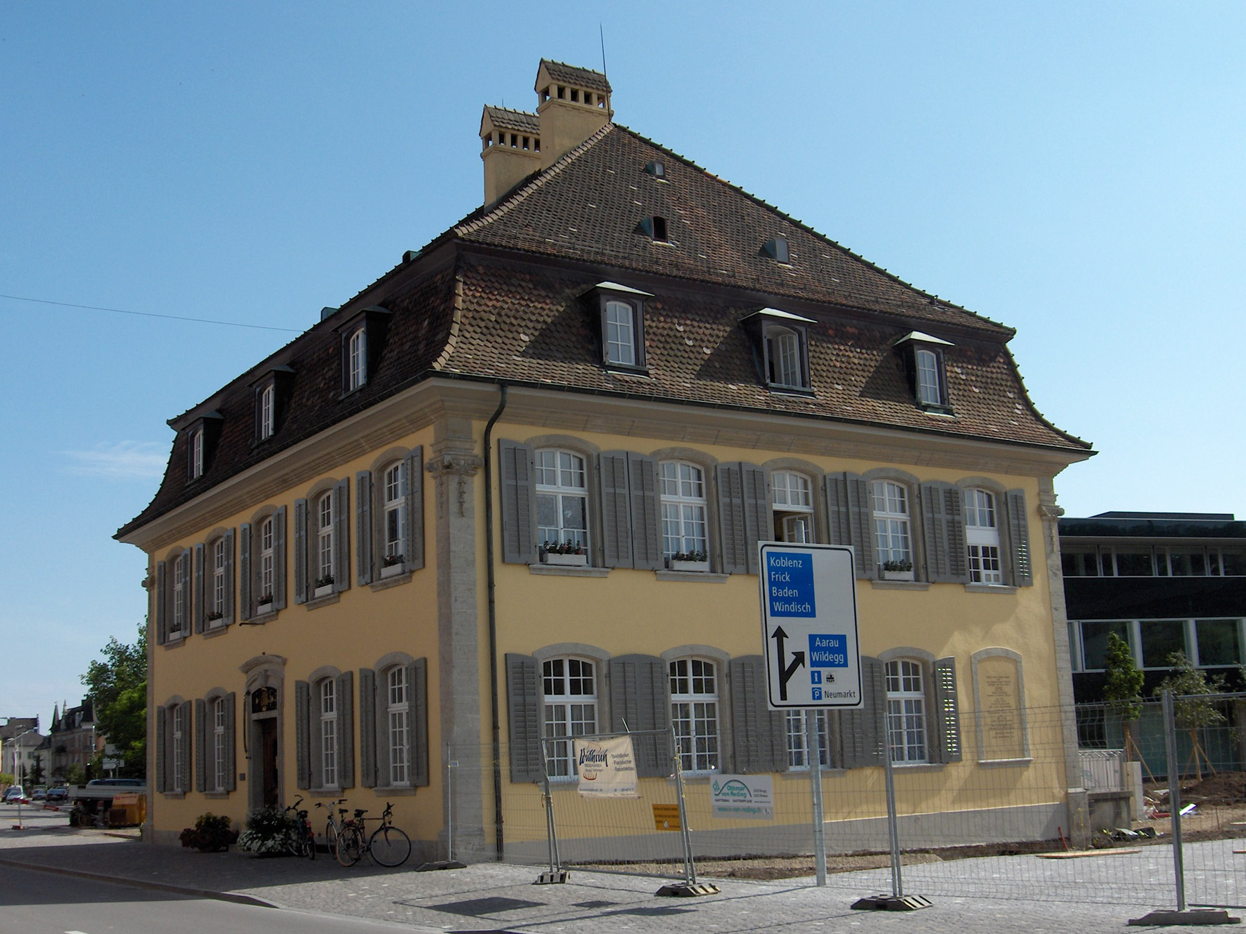 Brugg: Stadthaus (ehem. Palais Frölich) Fotografiert durch Voyager, 28. Juni 2006 Brugg: Town Hall (formerly Palais Frölich) Photo taken by Voyager, 28 June 2006